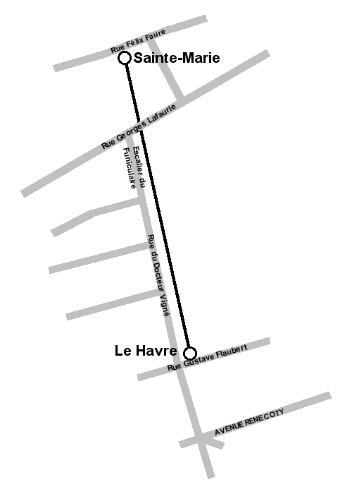 Map of Funiculaire du Havre, Normandie.